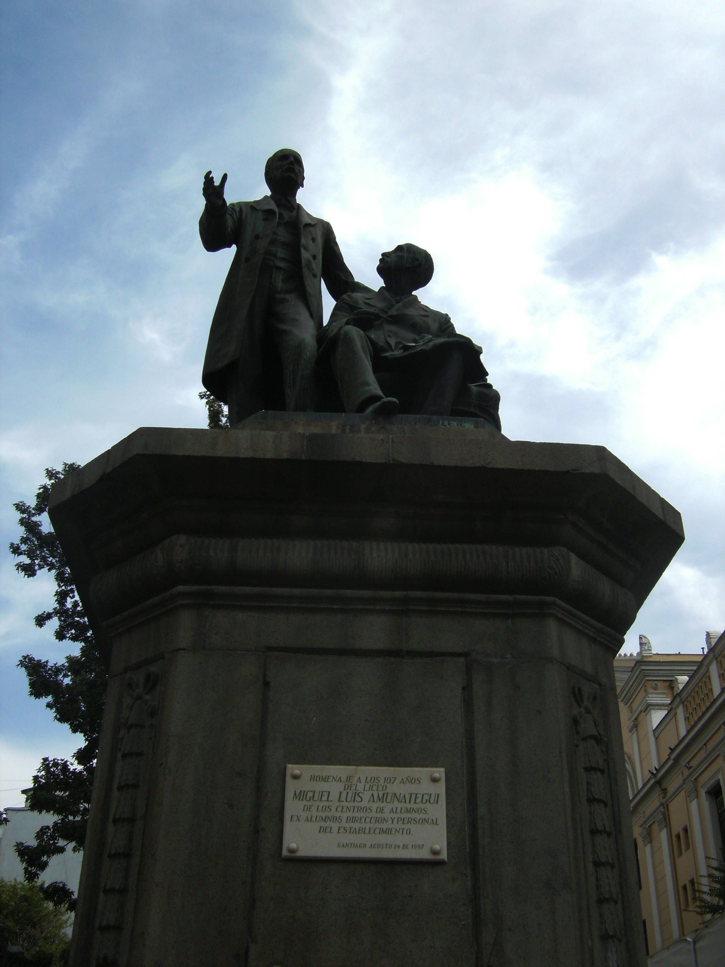 Perfil de la estatua de los Hermanos Amunategui al costado de la Universidad de Chile